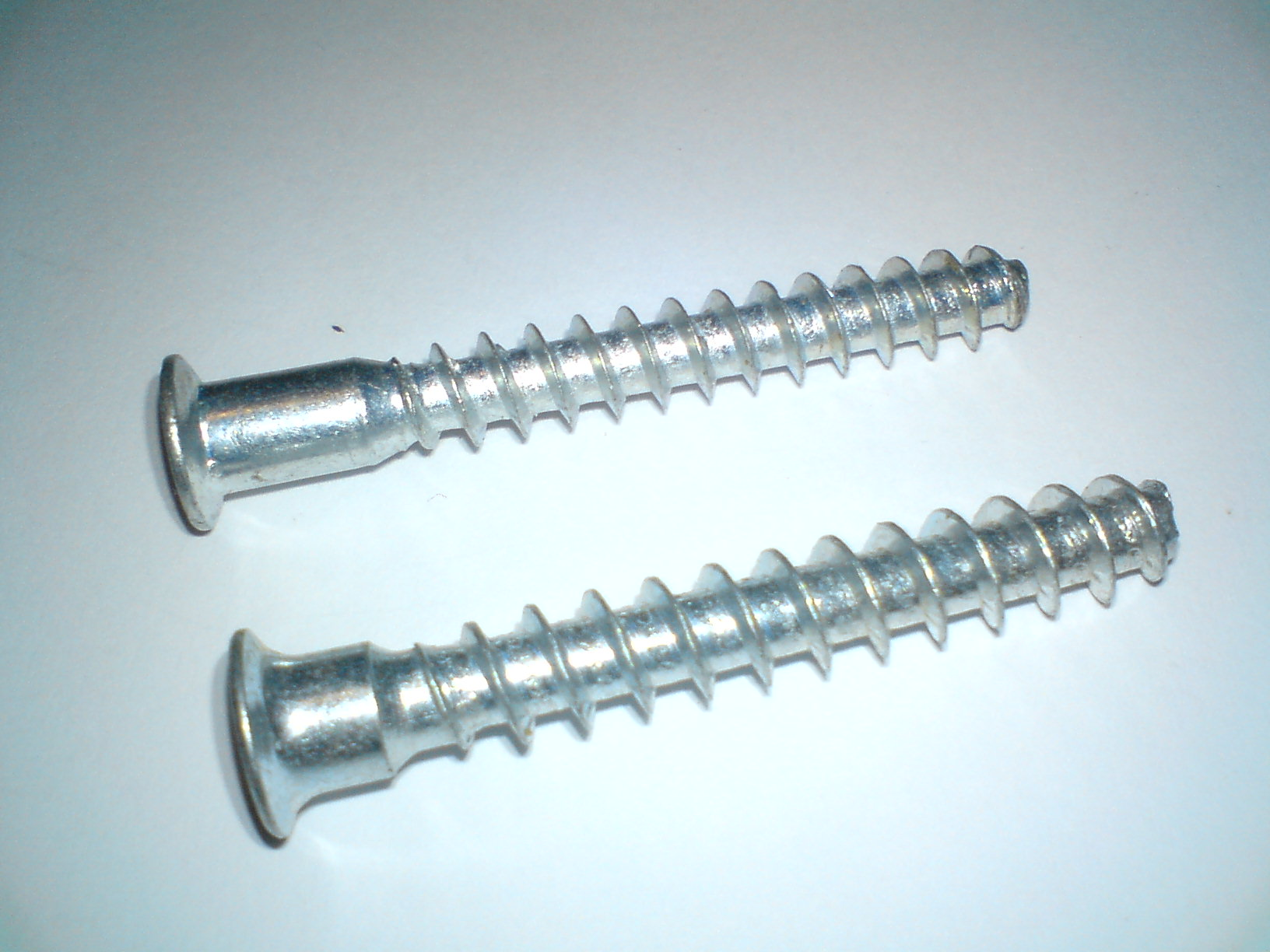 Konfirmaty Zastosowanie : Wkręt do montażu mebli z drewna i płyty wiórowej.